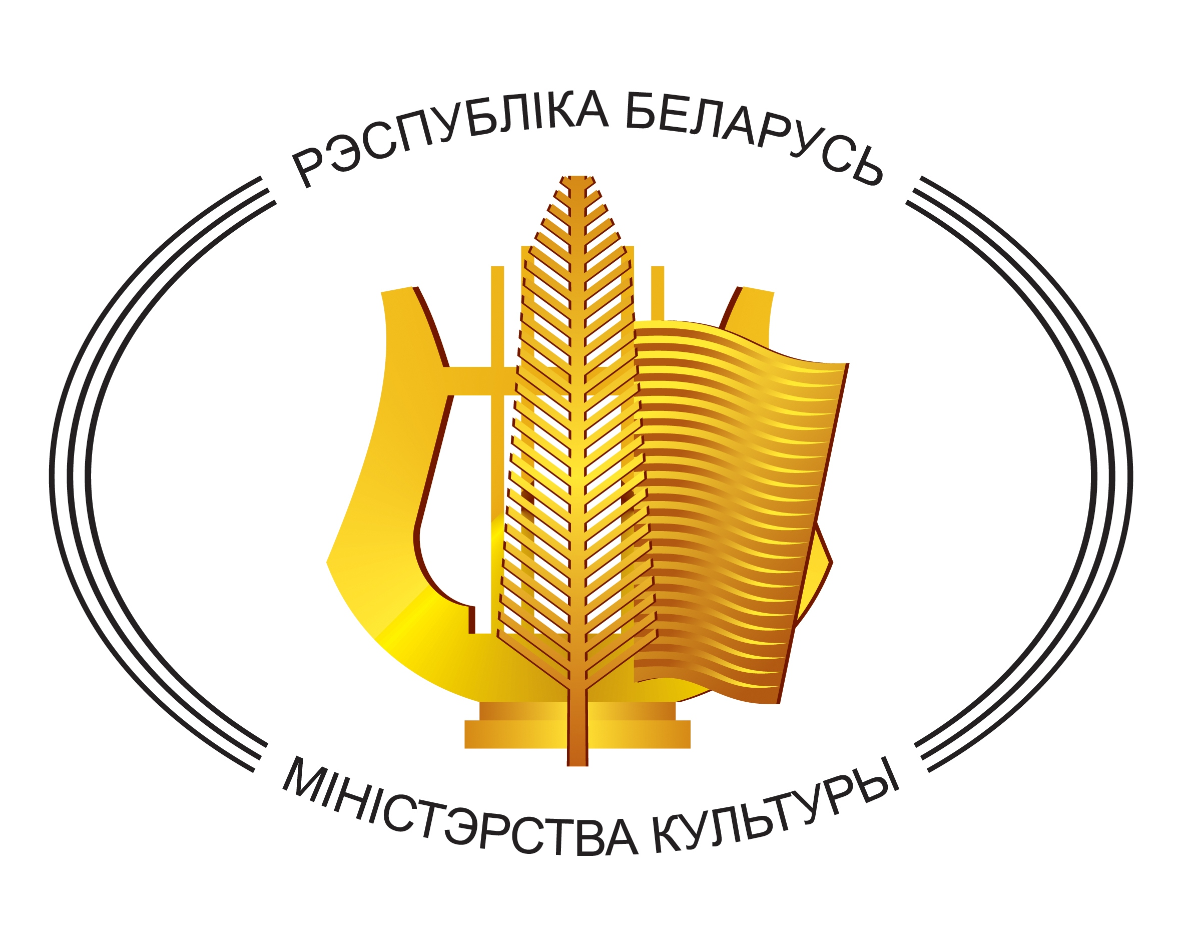 Эмблема Міністэрства культуры РБ